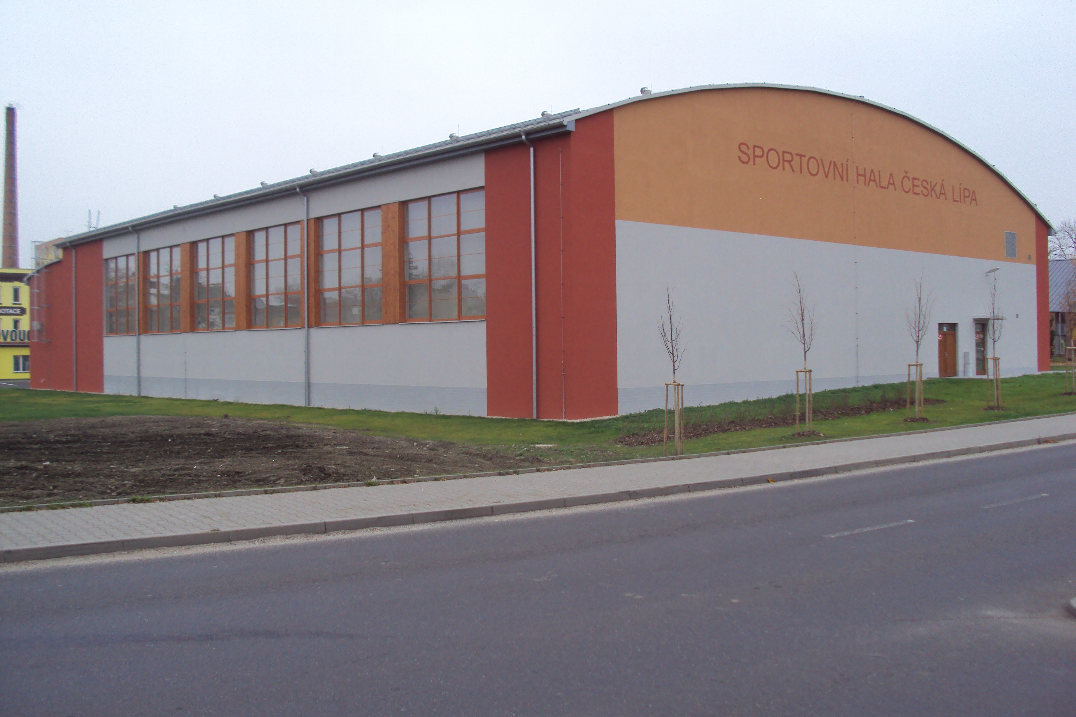 Zcela nová budova sportovní haly proti Kauflandu